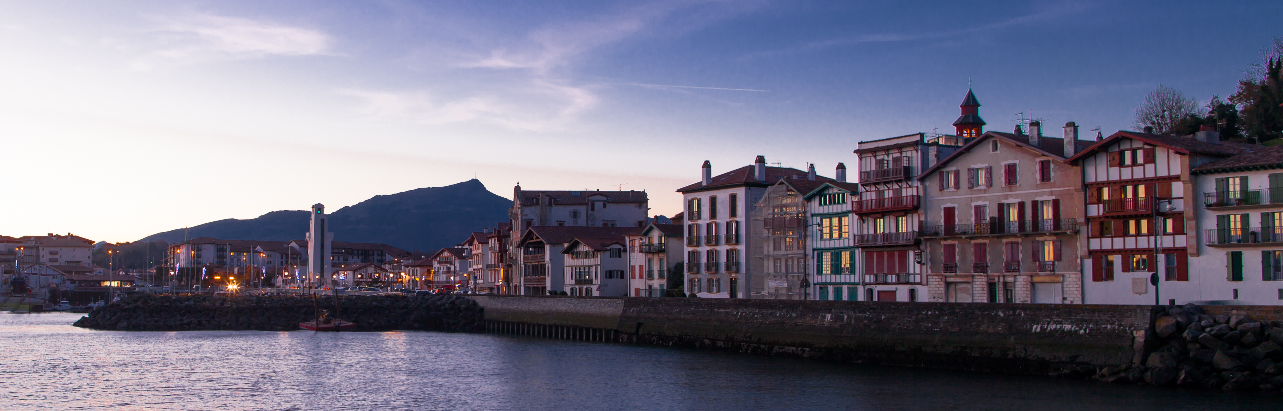 Ziburu eta Larrun, egunsentian.